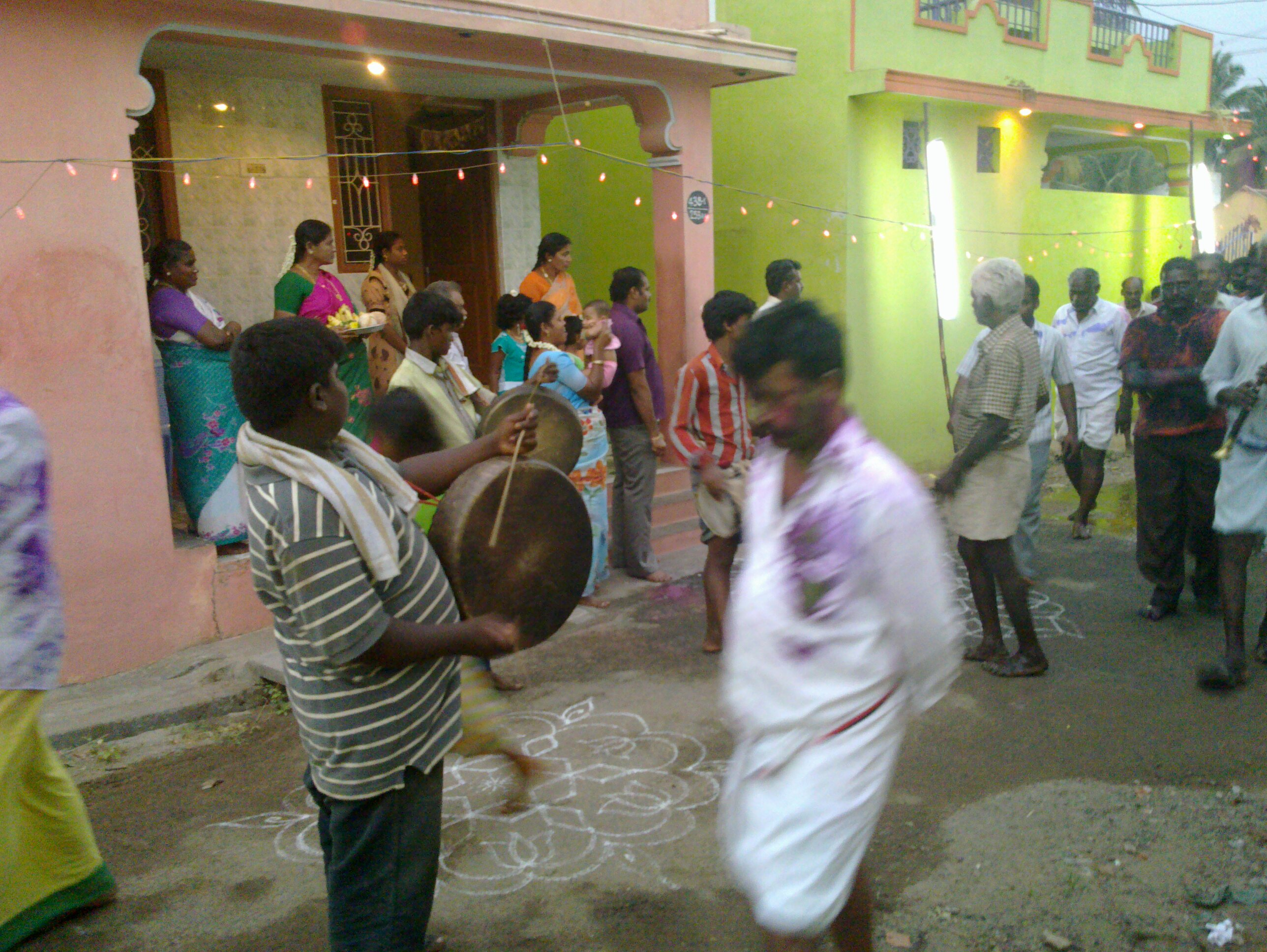 அம்மன் திருவிழா